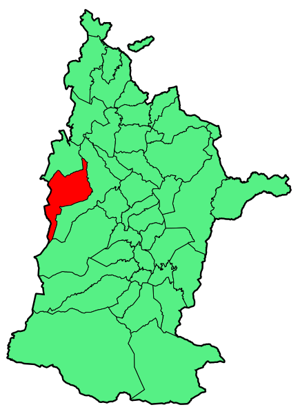 Aipaturiko udalerriaren kokapena Zuberoan